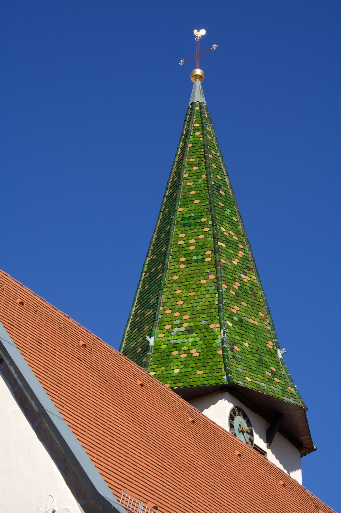 Kirchturm der evangelischen Kirche Kusterdingen